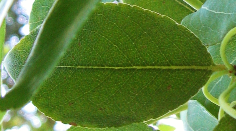 Zenobia pulverulenta. Real Jardín Botánico de Madrid.